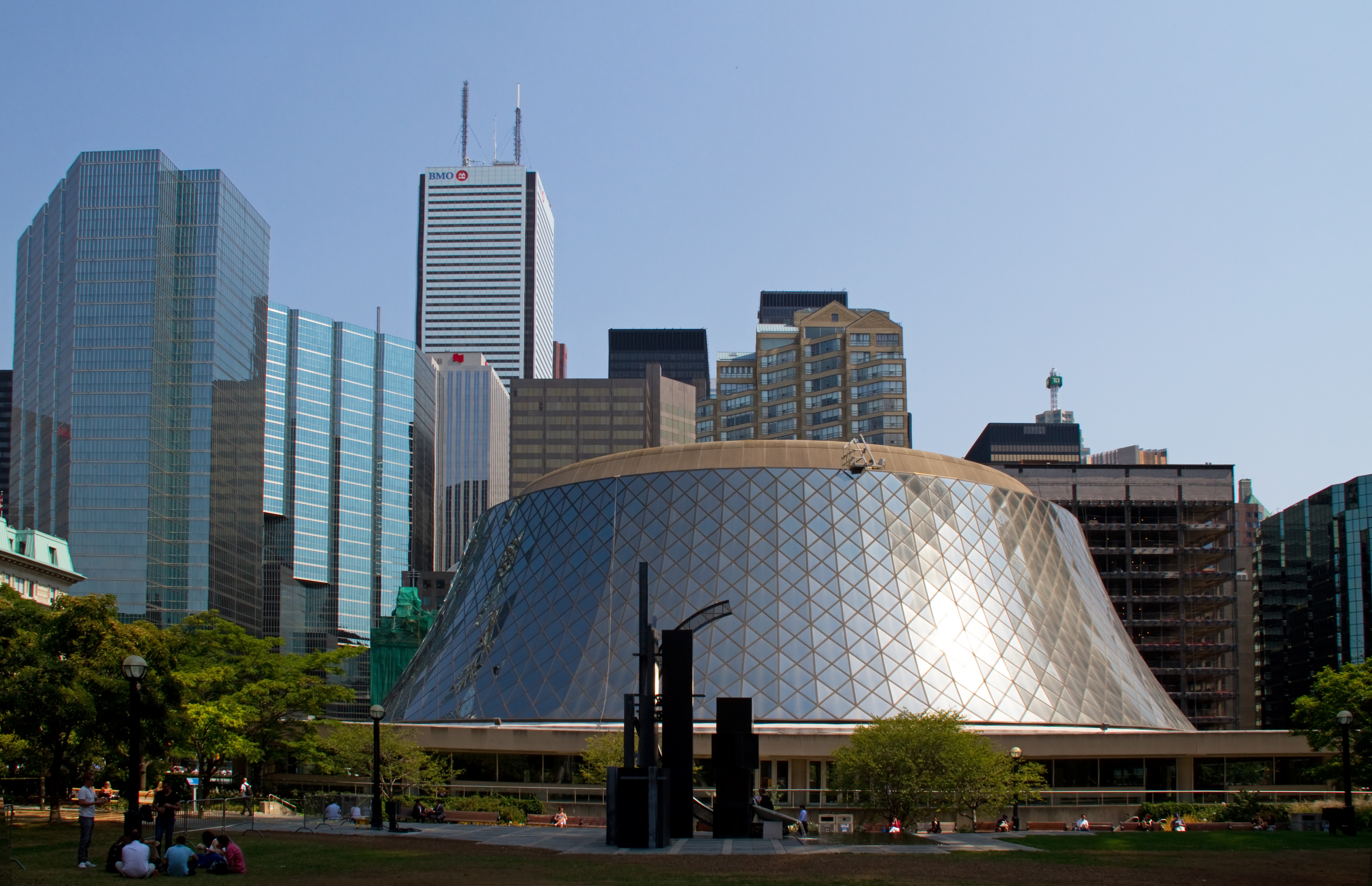 Toronto 2